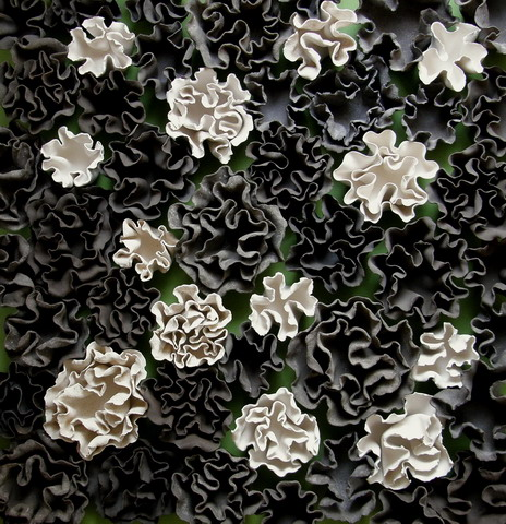 Lidia Boševski: "Ritam prirode - Lactuca sativa", keramika, 2009.